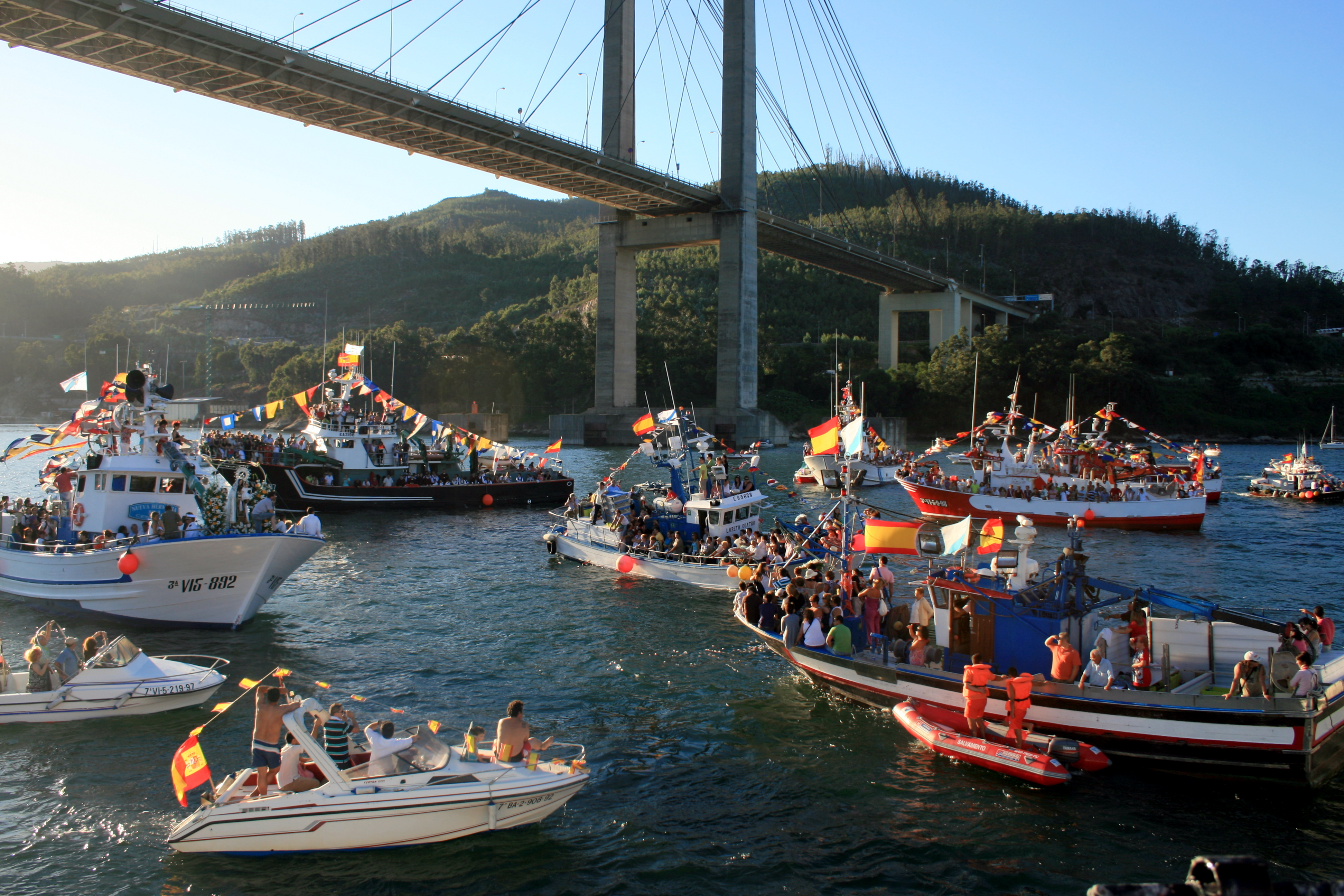 Puente de Rande procesión del Carmen 2010